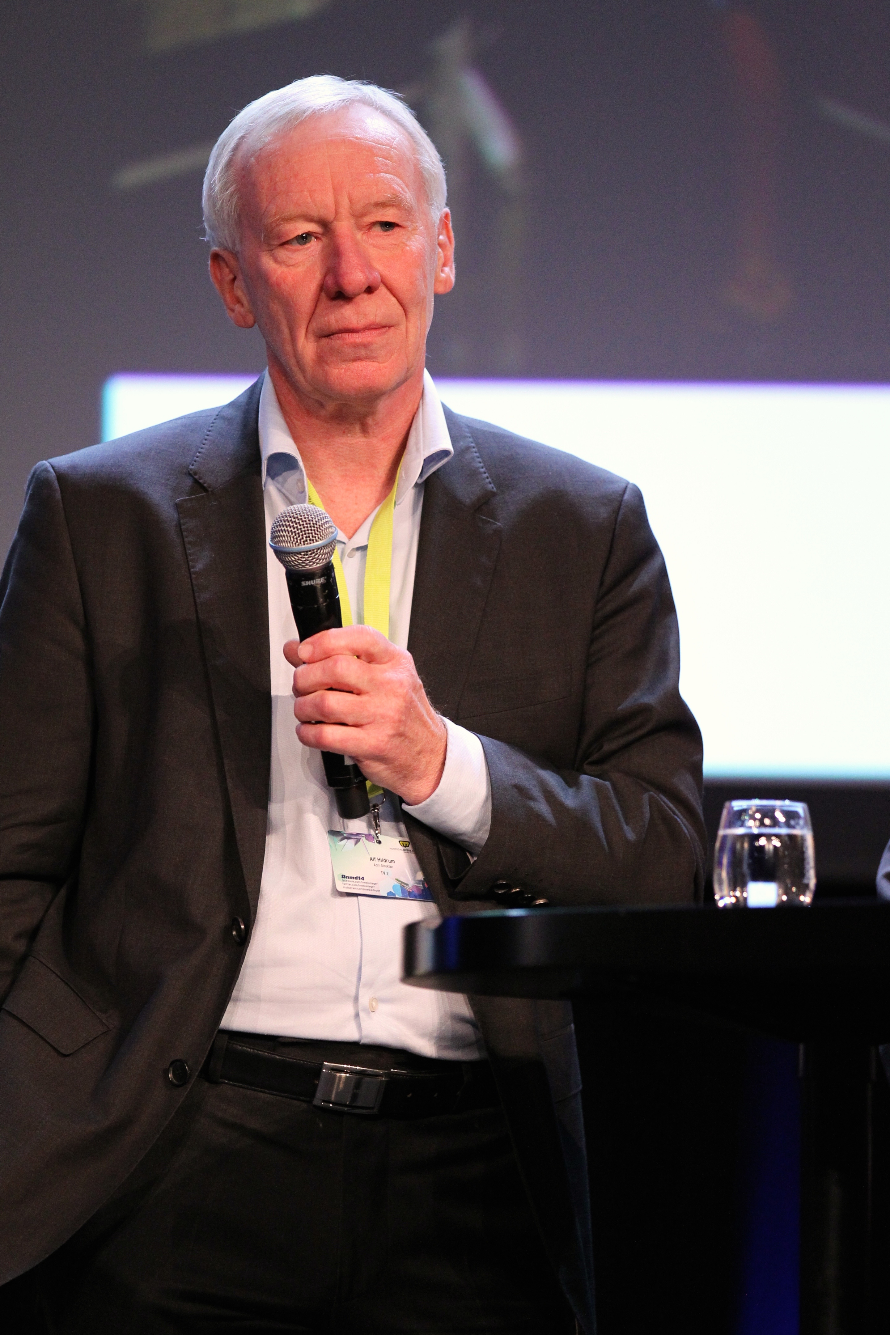 Medvirkende: Adm. dir. og sjefredaktør Alf Hildrum (TV 2), Rektor Dag Rune Olsen (Universitetet i Bergen), Kringkastingssjef Thor Gjermund Eriksen (NRK), Sjefredaktør Gard Steiro (Bergens Tidende), Sjefredaktør Anders Nyland (Bergensavisen), Visepresident Fredrik Gunnestad (Vizrt), Pressekonferansen ble ledet av Svein Ove Søreide Foto: Knut Jensen / Nordiske Mediedager